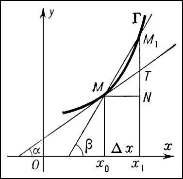 Побудова дотичної до графіка функції